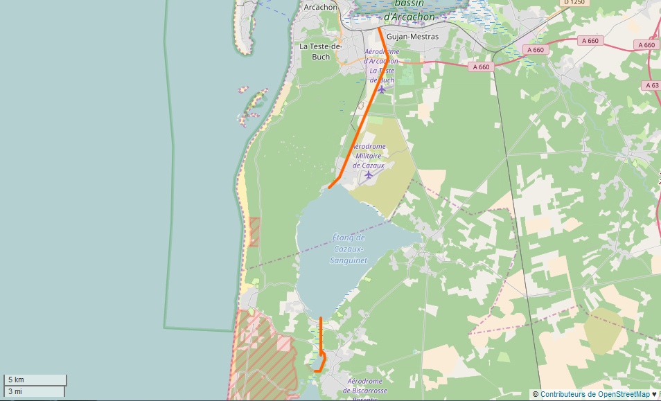 Canal des Landes (tracé) This map may be incomplete, and may contain errors. Don't rely solely on it for navigation.